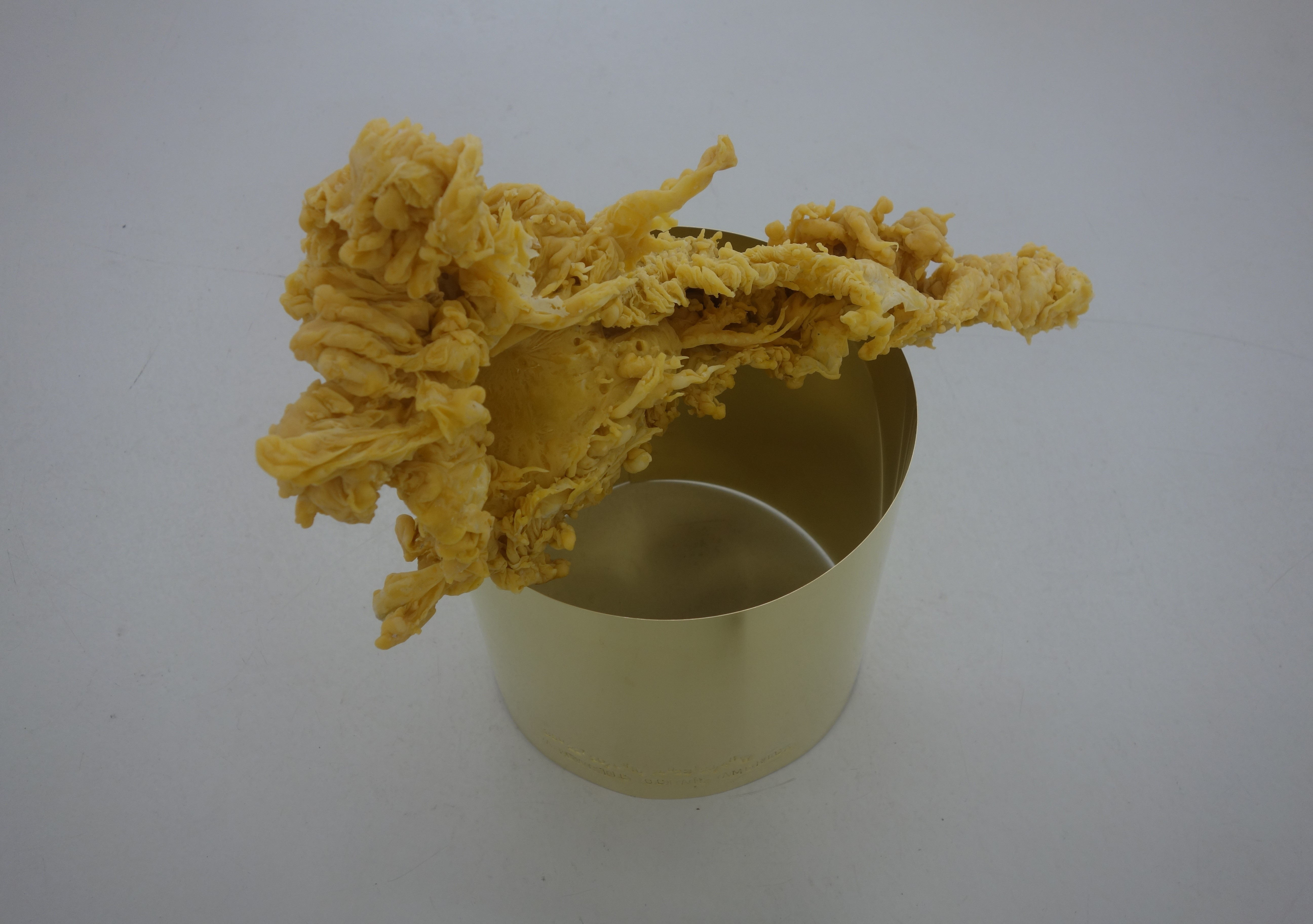 Stephanie Lüning,39°22'50.8"N, 74°23'28.4"W, Atlantic Ocean, Atlantic City, New Jersey, USA Bienenwachs auf Messingsockel 46x43x25 cm